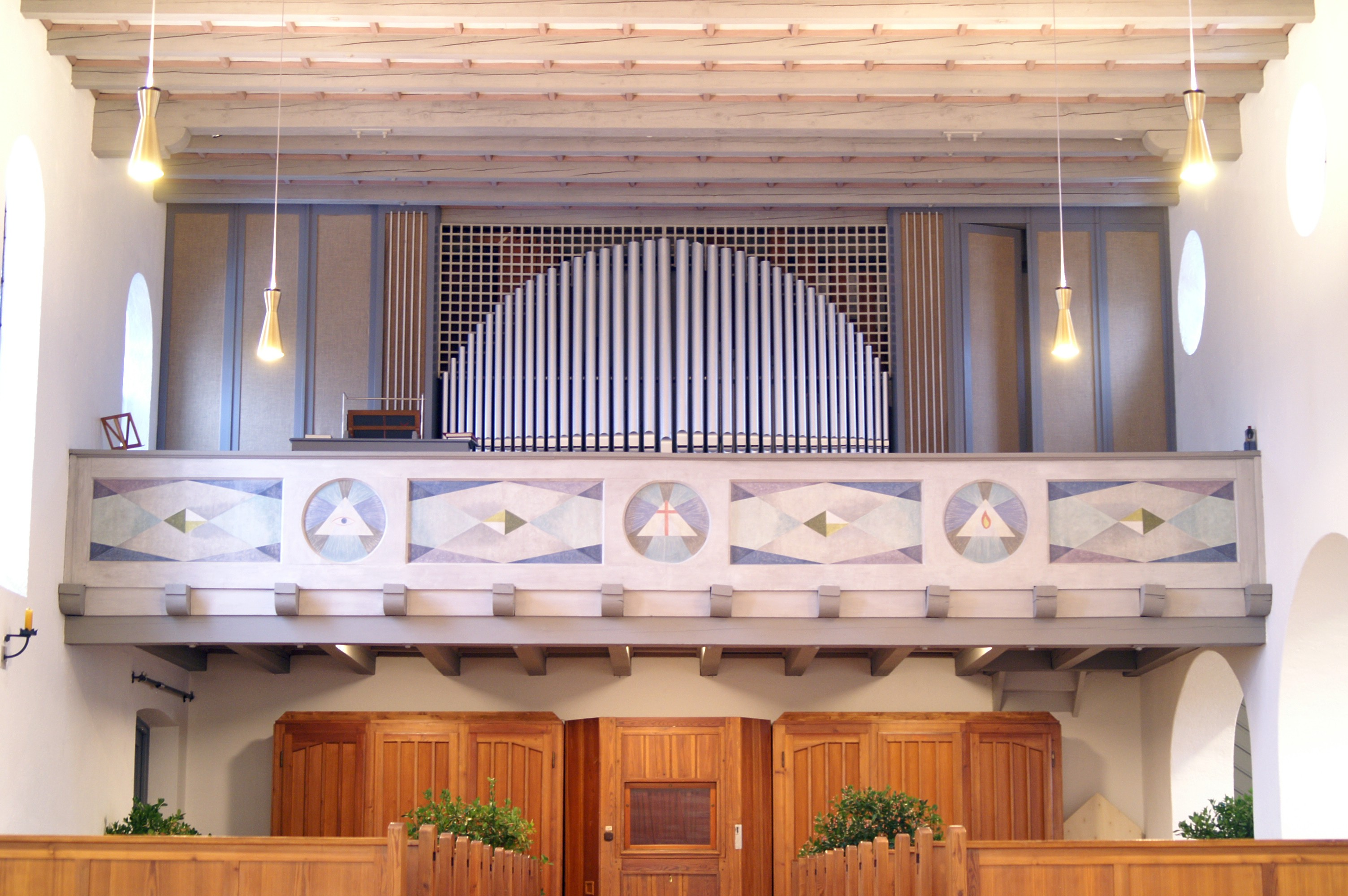 Weise-Orgel der Pfarrkirche St. Josef, Ziegetsdorf (Regensburg)